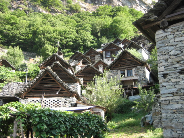 Brontallo TI